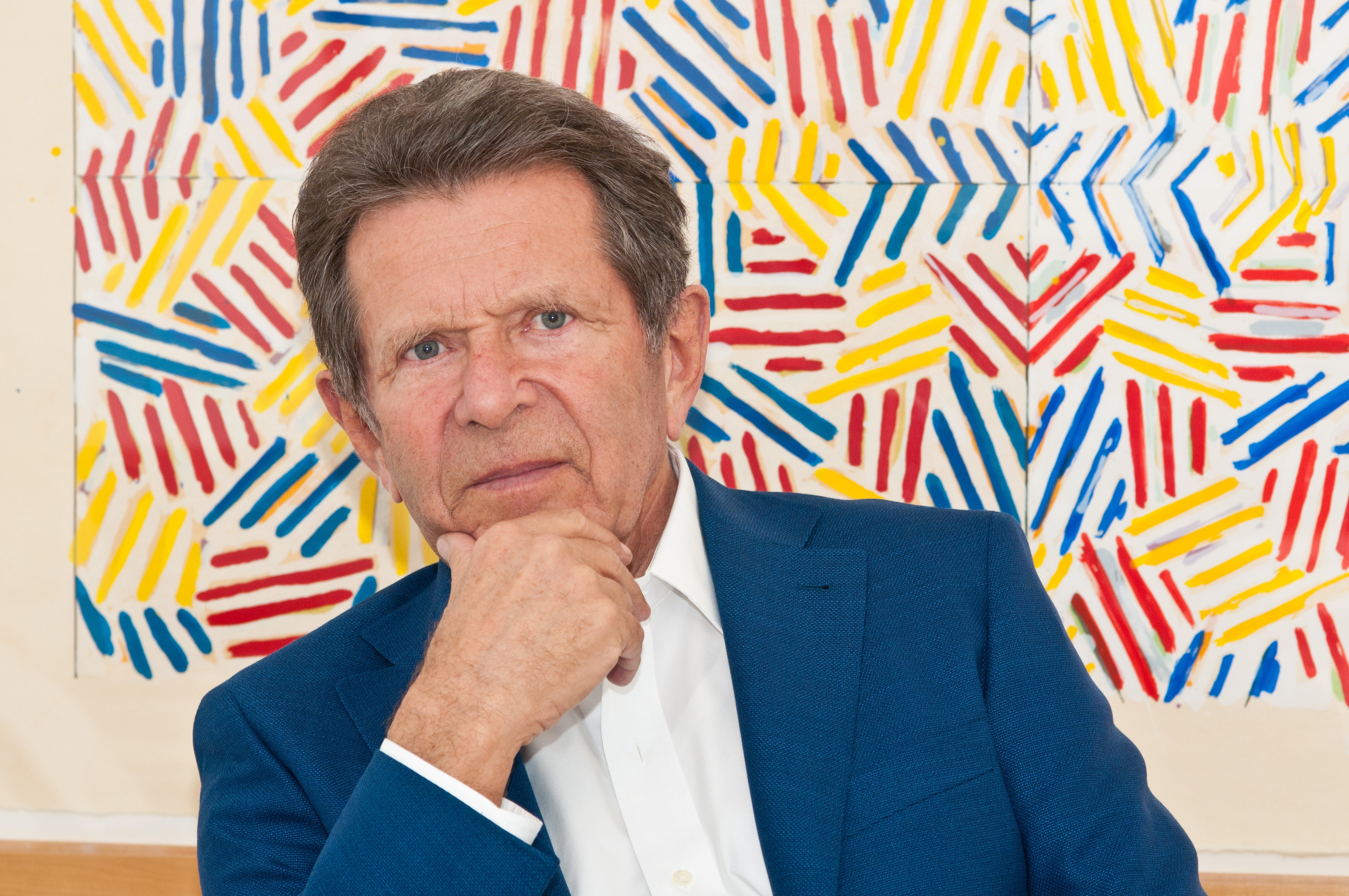 Kunstsammler Hubert Looser